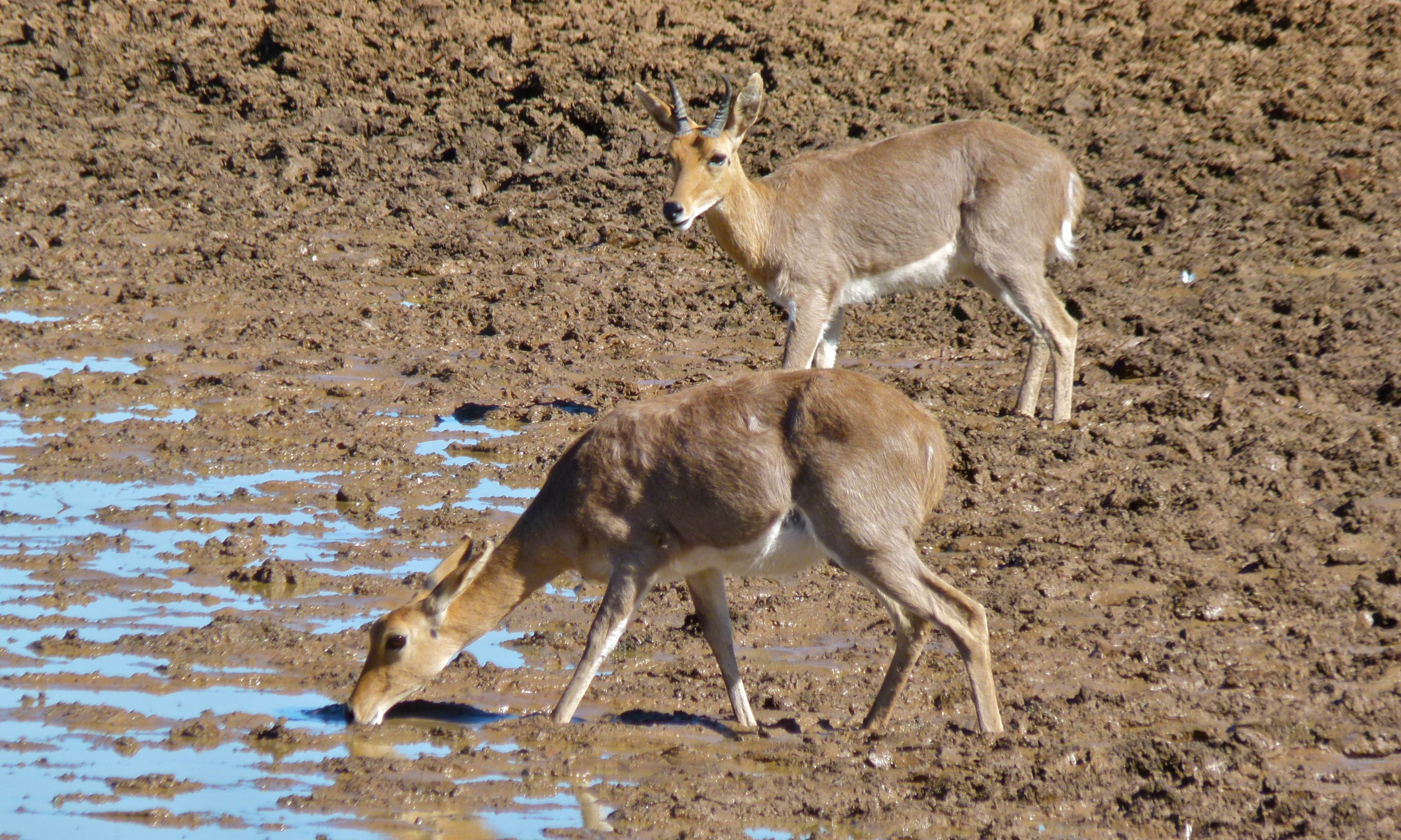 Stofdam Bird Hide, Mokala NP, SOUTH AFRICA